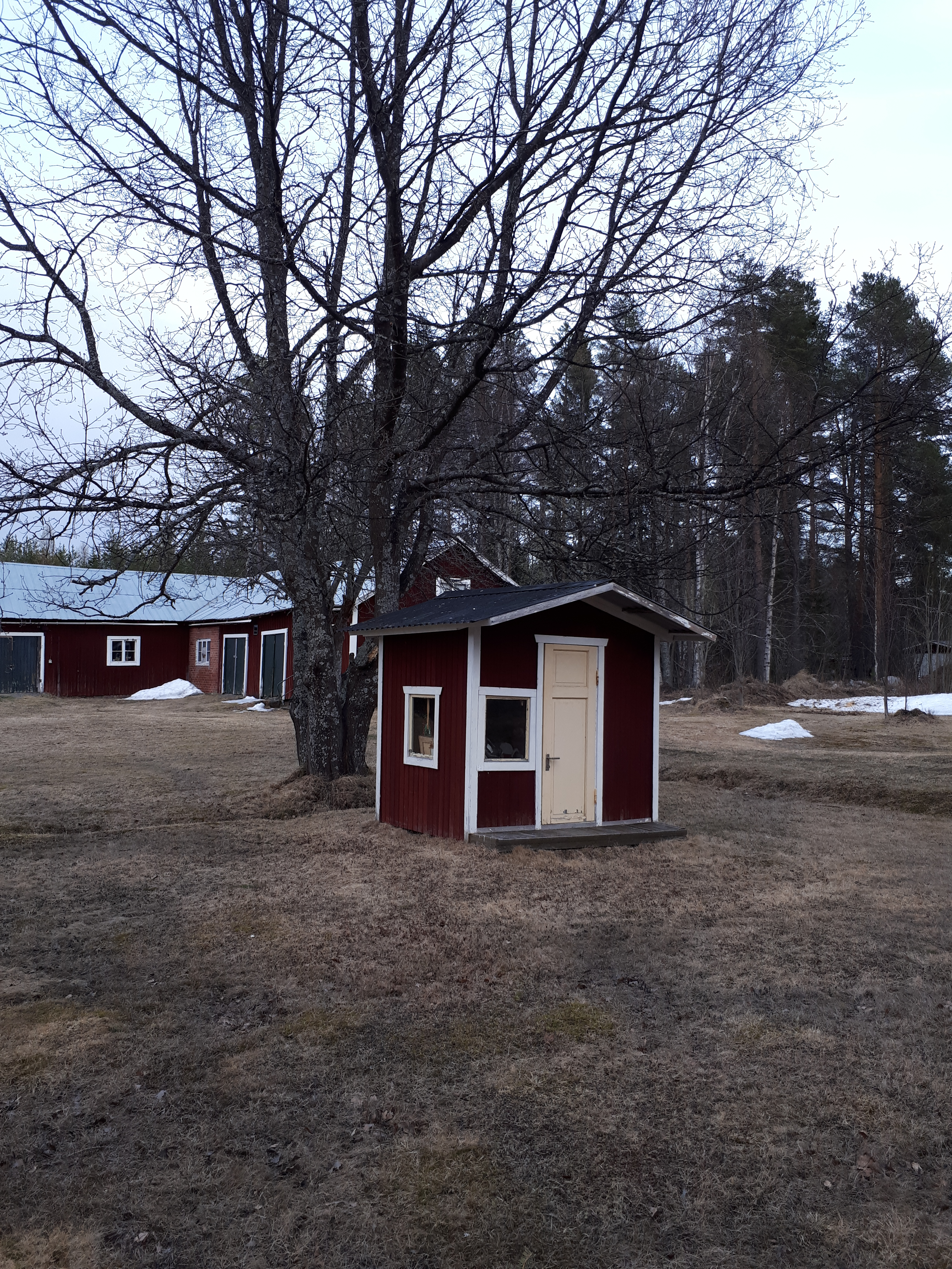 En traditionell lekstuga någonstans i Västerbotten som byggdes 2007.